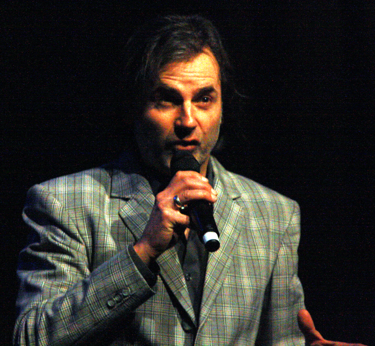 Tom Haydn